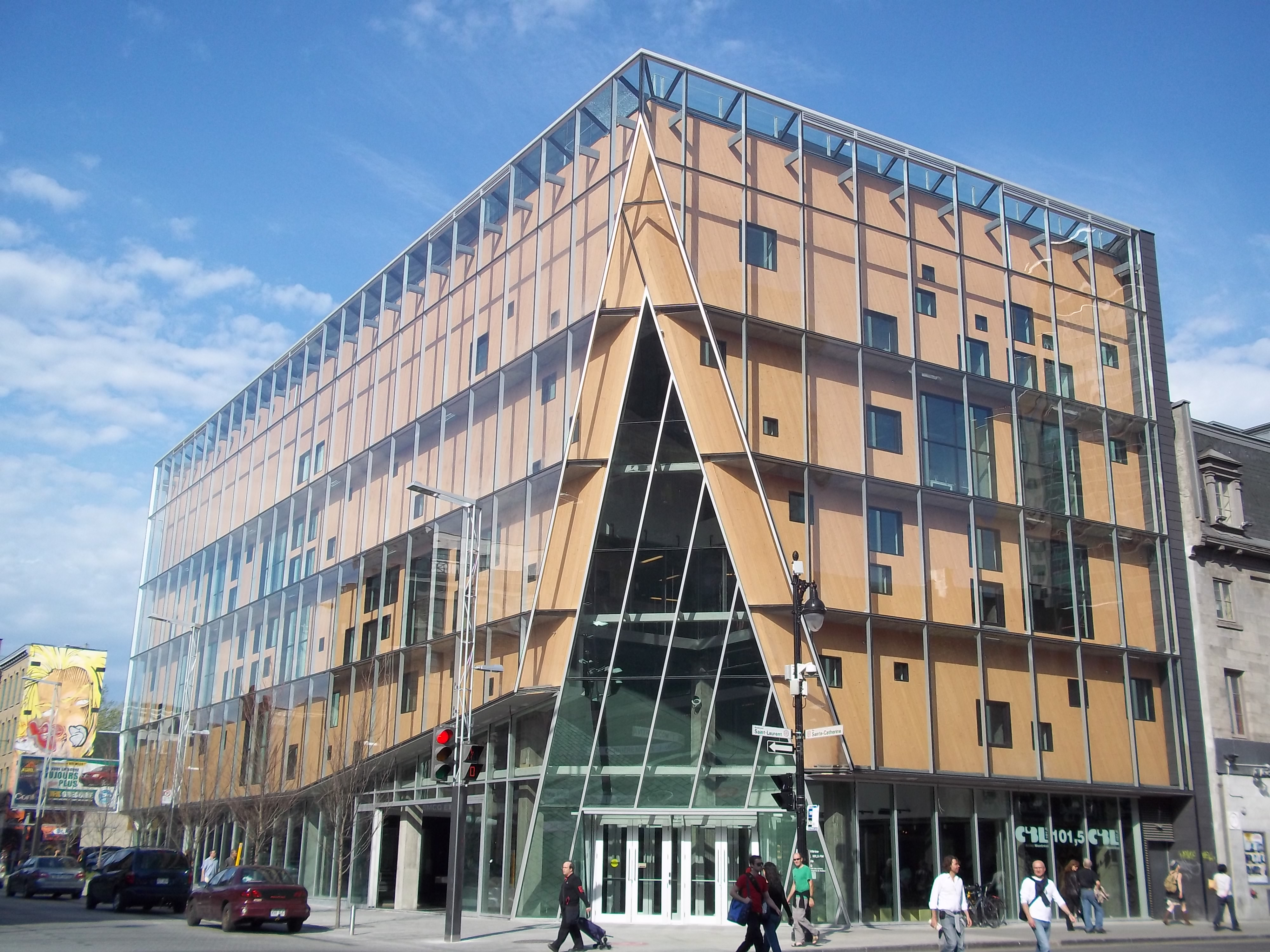 2-22 Sainte-Catherine Est, Montréal